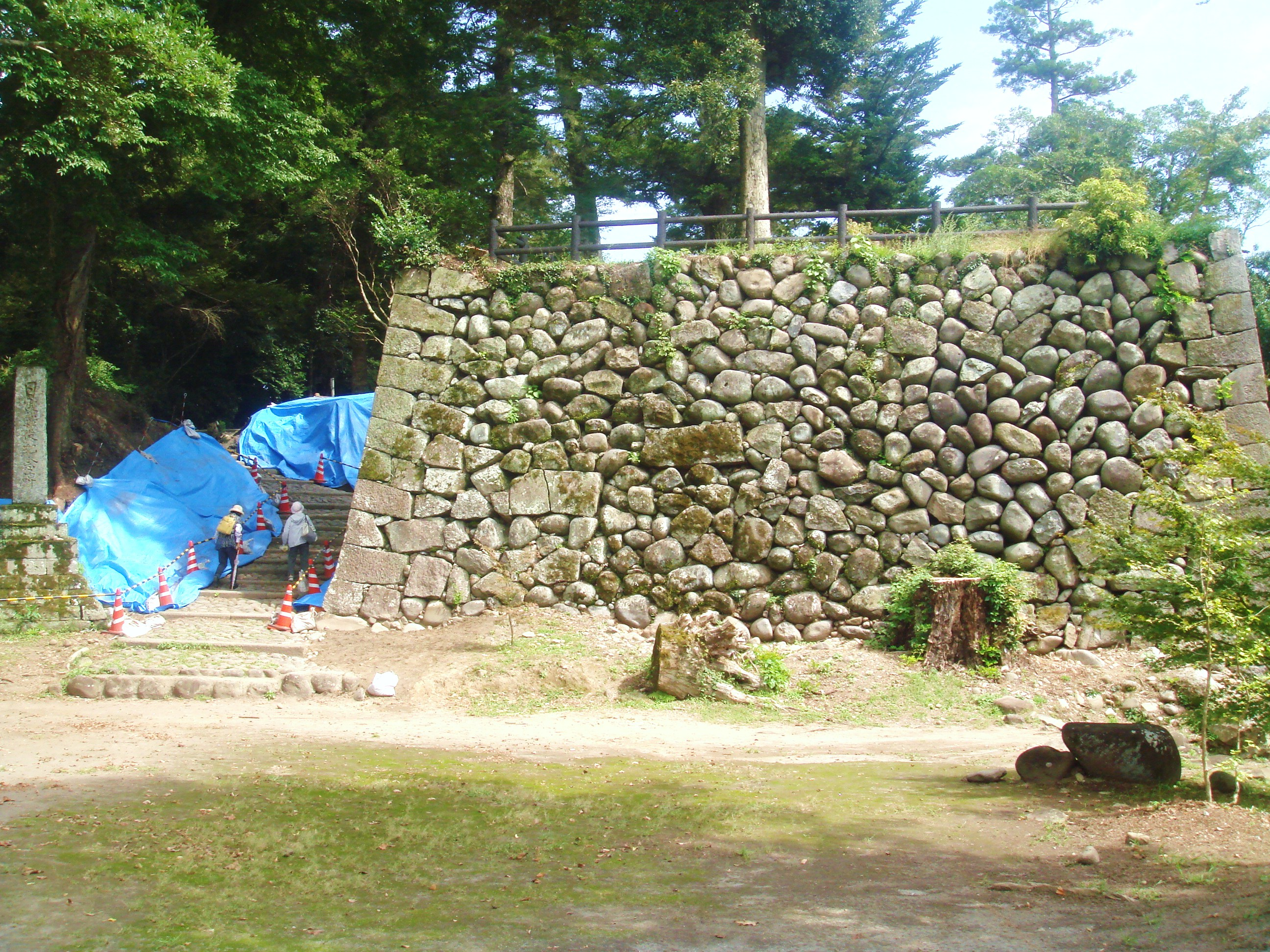 永山城本丸跡の石垣。櫓台であったとされる。図は東面で、月隈神社前、俗に二の丸跡と呼ばれる敷地より撮影した。2011-08-16 以降に行われた埋蔵文化財発掘調査にともない、周囲に繁茂していた樹木が伐採されたため、全体像が詳らかとなった。